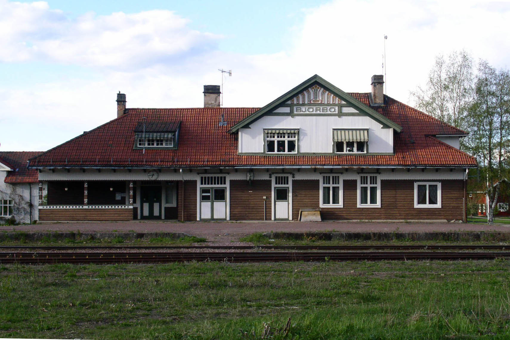 Björbo Järnvägsstation, Dalarna